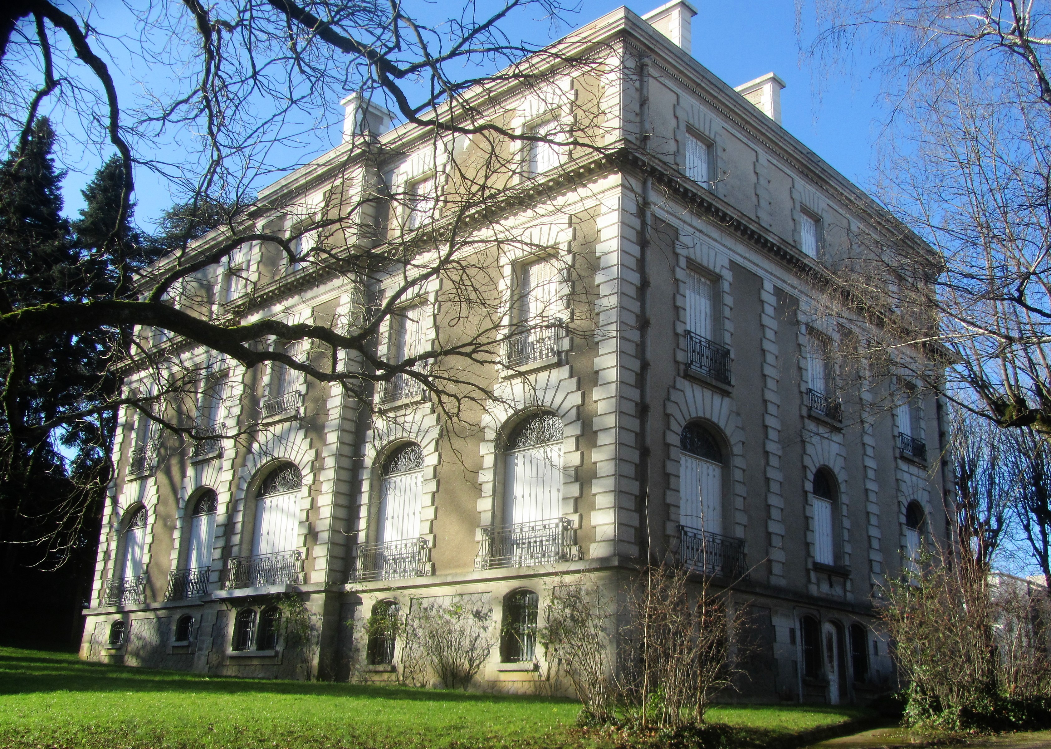 villa Vermorel